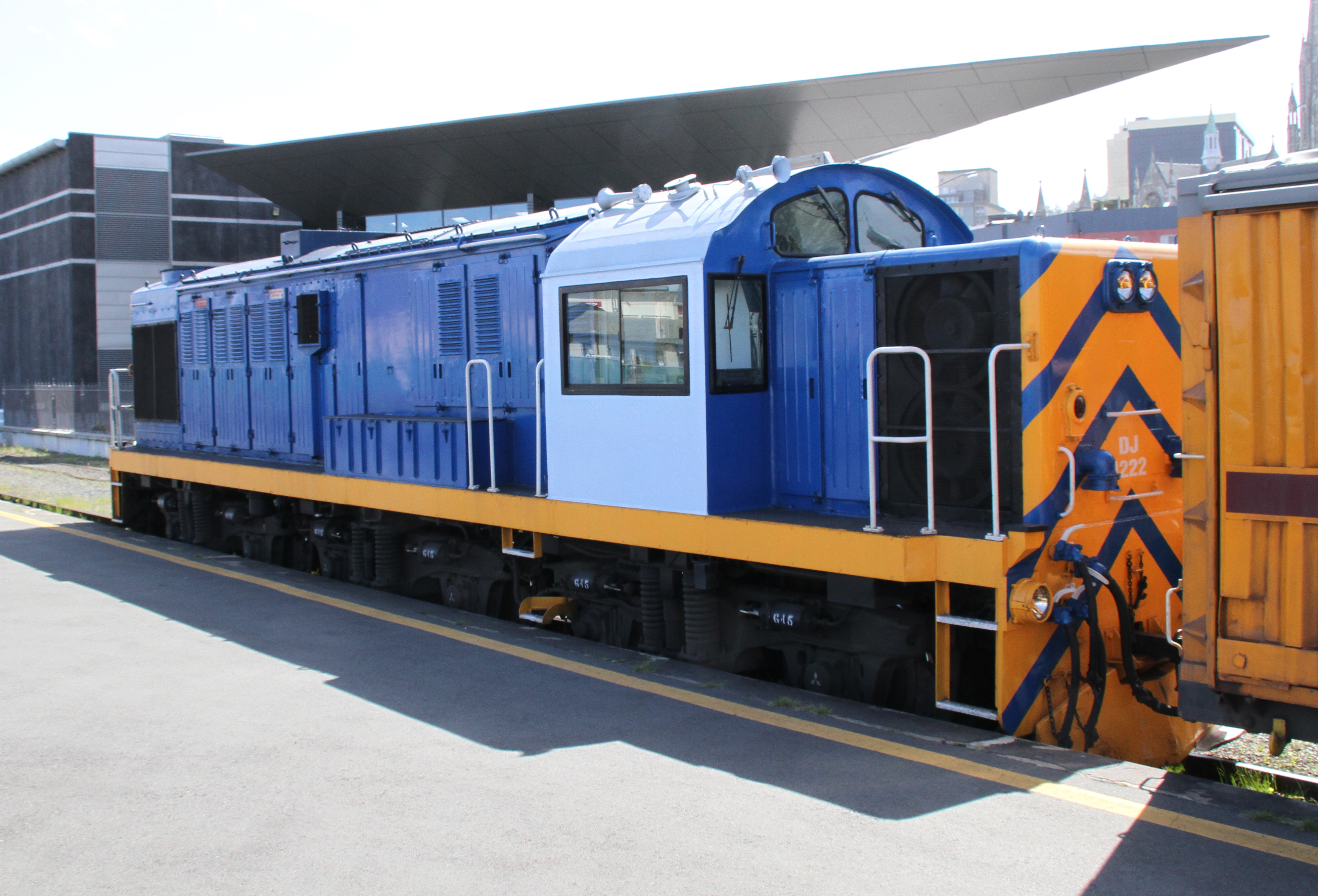 Locomotive Dunedin